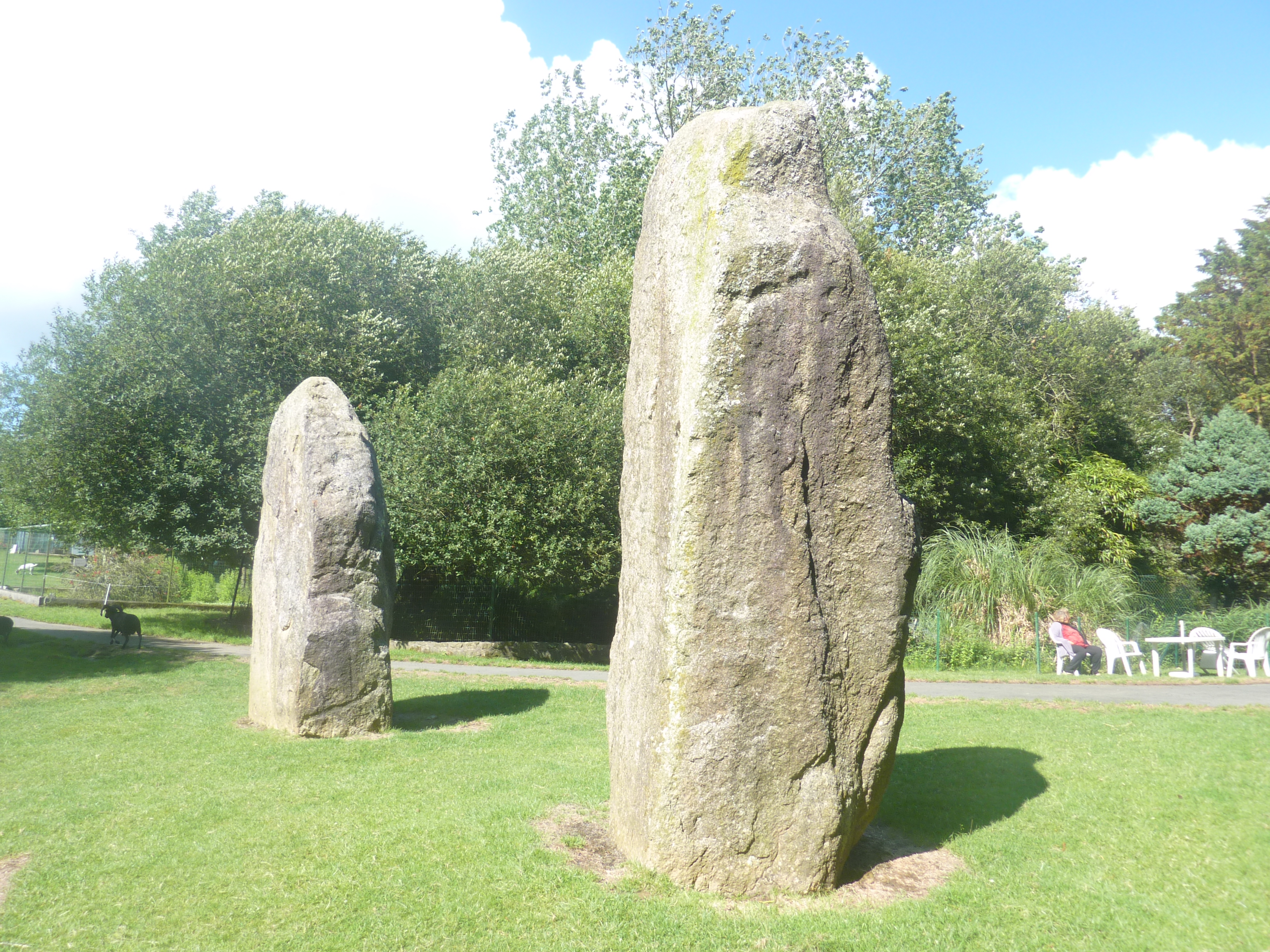 Peumerit : ces deux menhirs, trouvés initialement couchés à Kerloazec, du parc animalier de la Pommeraie ont été déplacés et érigés autour de l'étang du parc animalier de La Pommeraie.